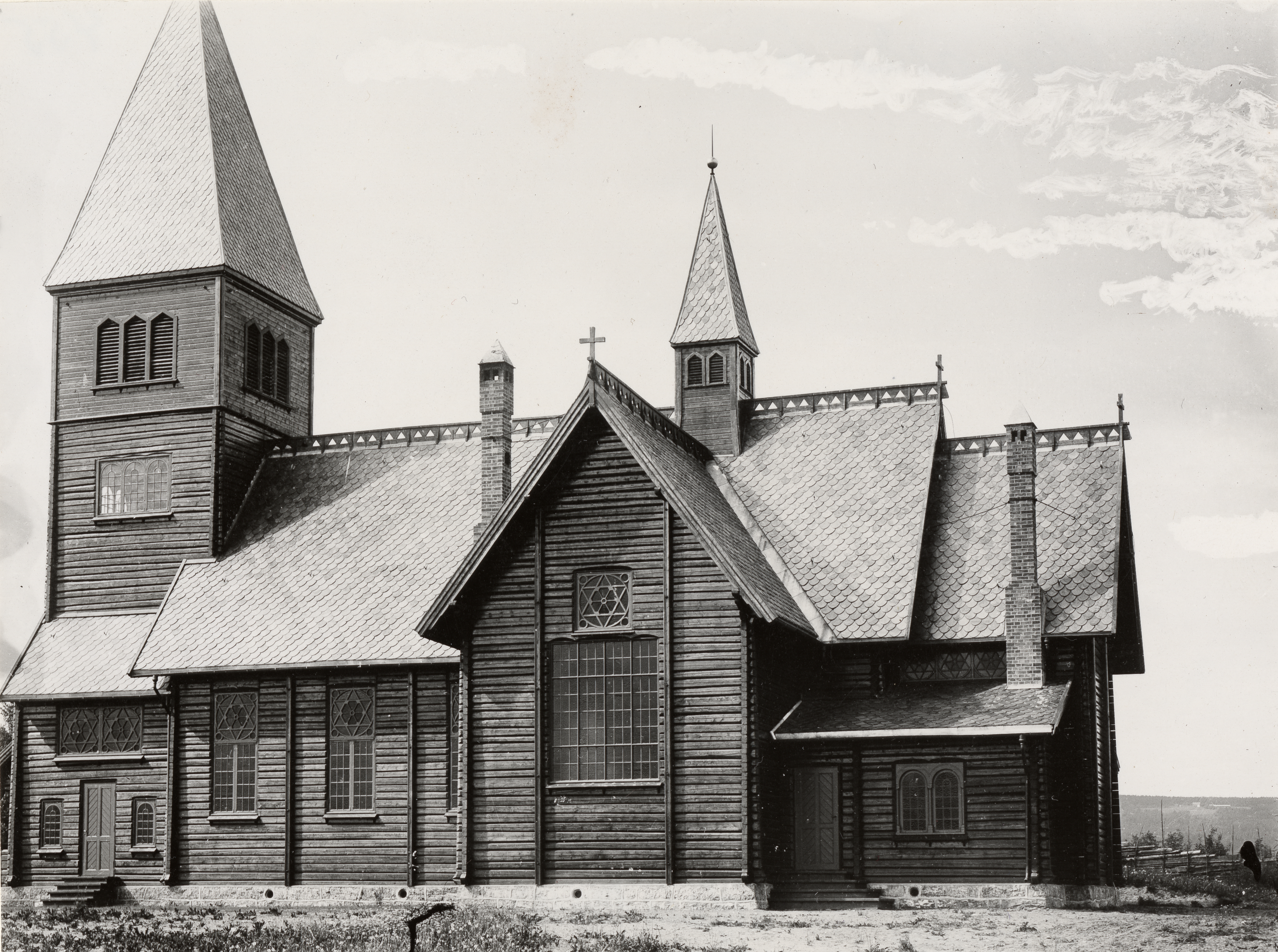 Vangsåsen kirke i Vang, Hedmark This image on crowdsourcing geotagging platform Fotodugnad